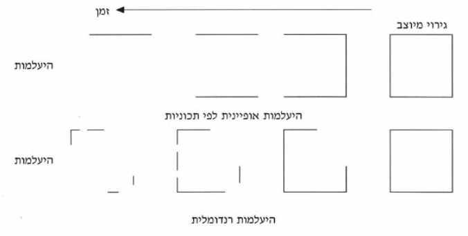 תיאור סכמטי פשוט המראה היעלמות בגירוי מיוצב שקוראת בפועל אל מול היעלמות רנדומלית